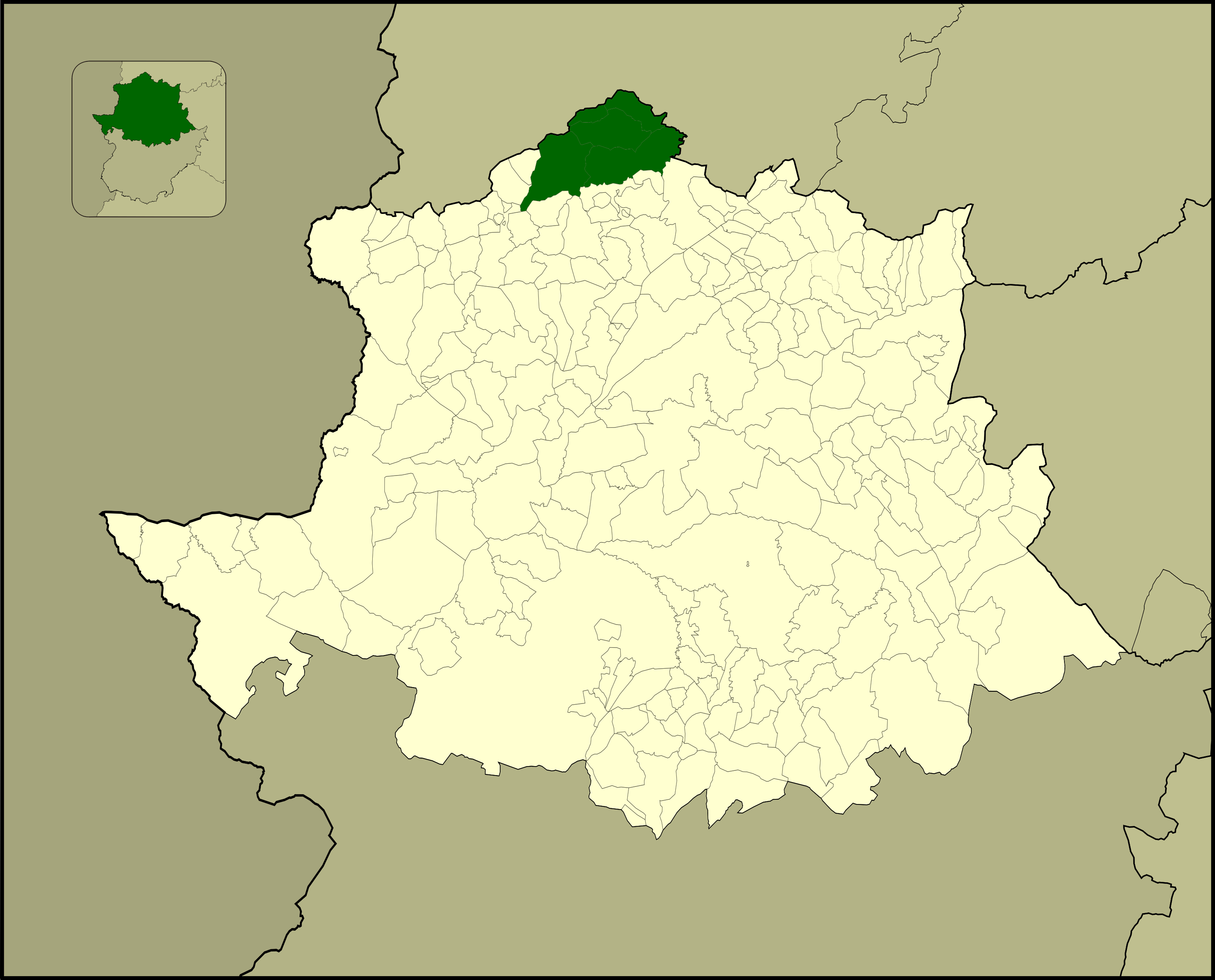 Situación de la comarca de Las Hurdes